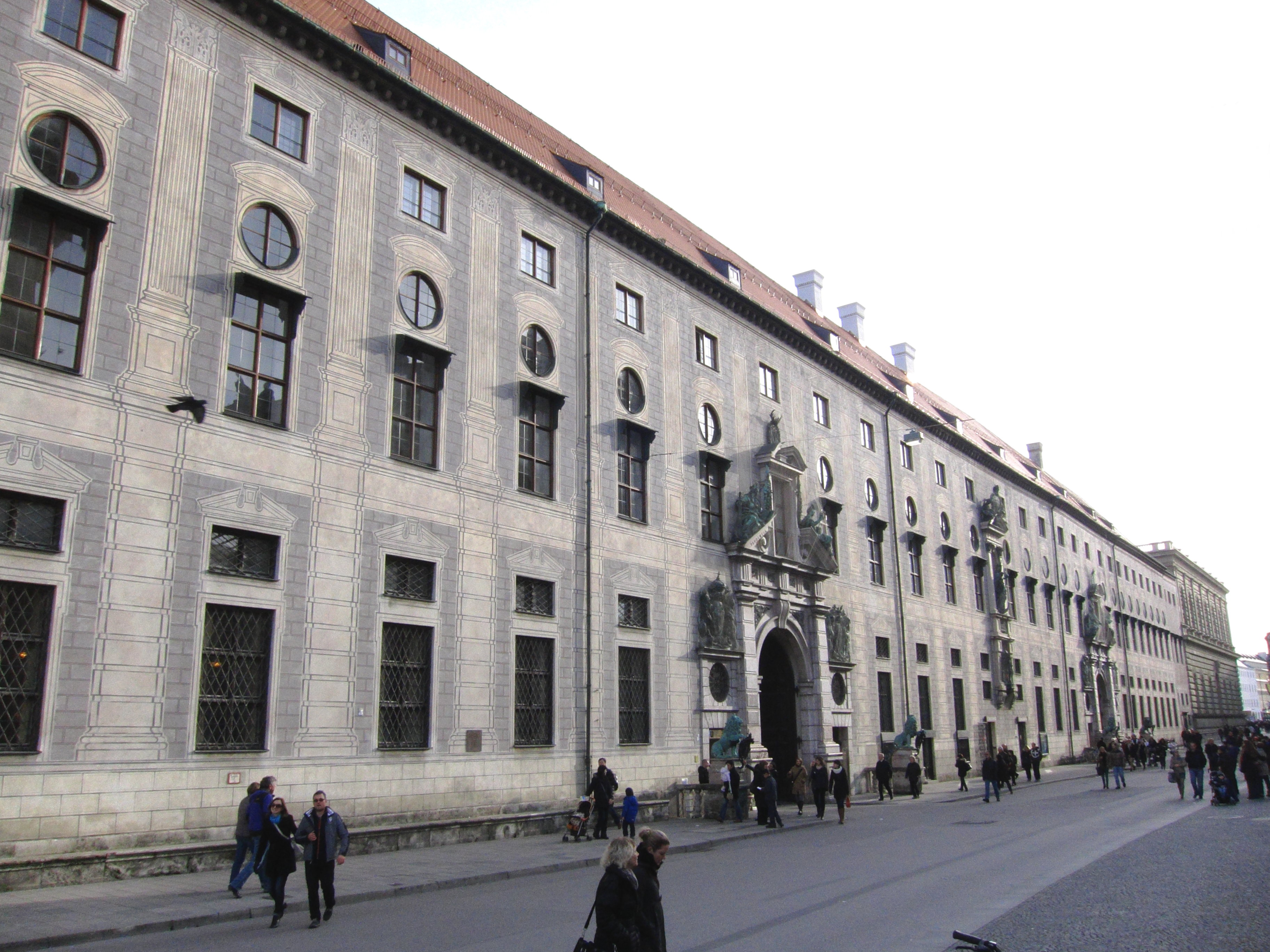 Residenzstraße, Westfassade der Residenz